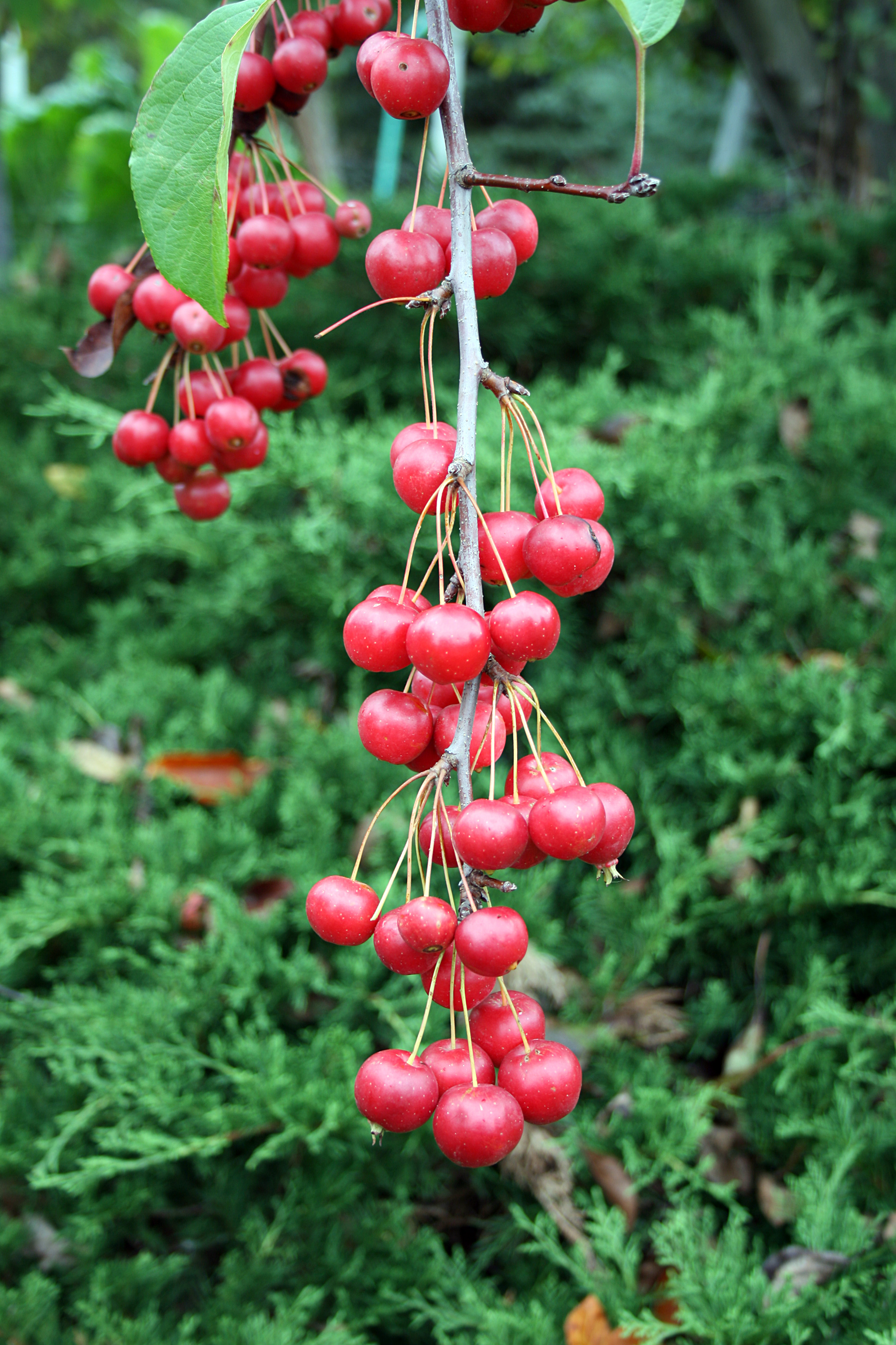 Crab Apple (Malus sikkimensis) fruit